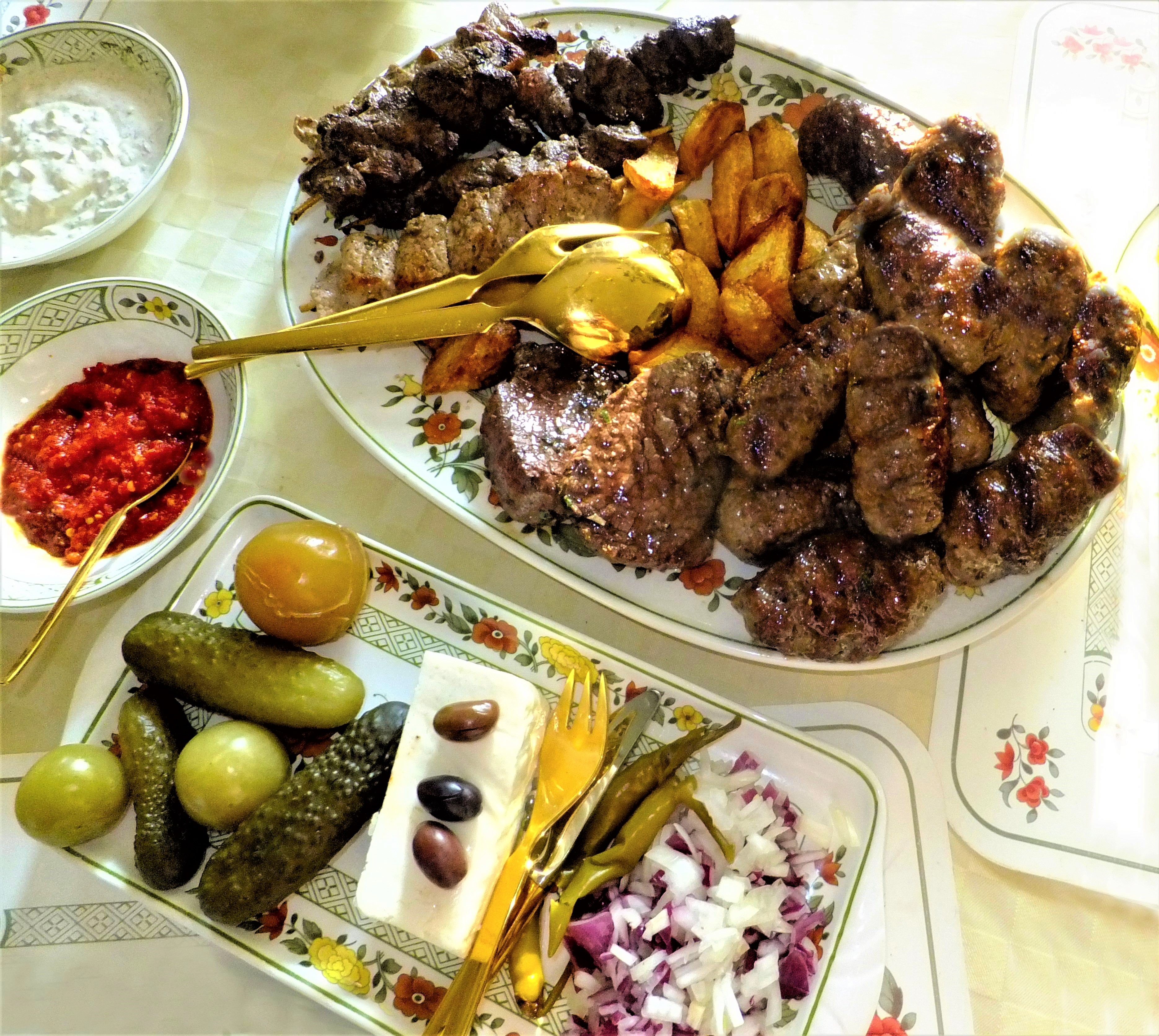 Rumänischer Mixed Grill mit Mititei, Lamm- und Schweinspieße, Rindersteak und Leber sowie Eigelegtes, Schafskäse, Peperoni- und Joghurtcreme , Backkartoffeln